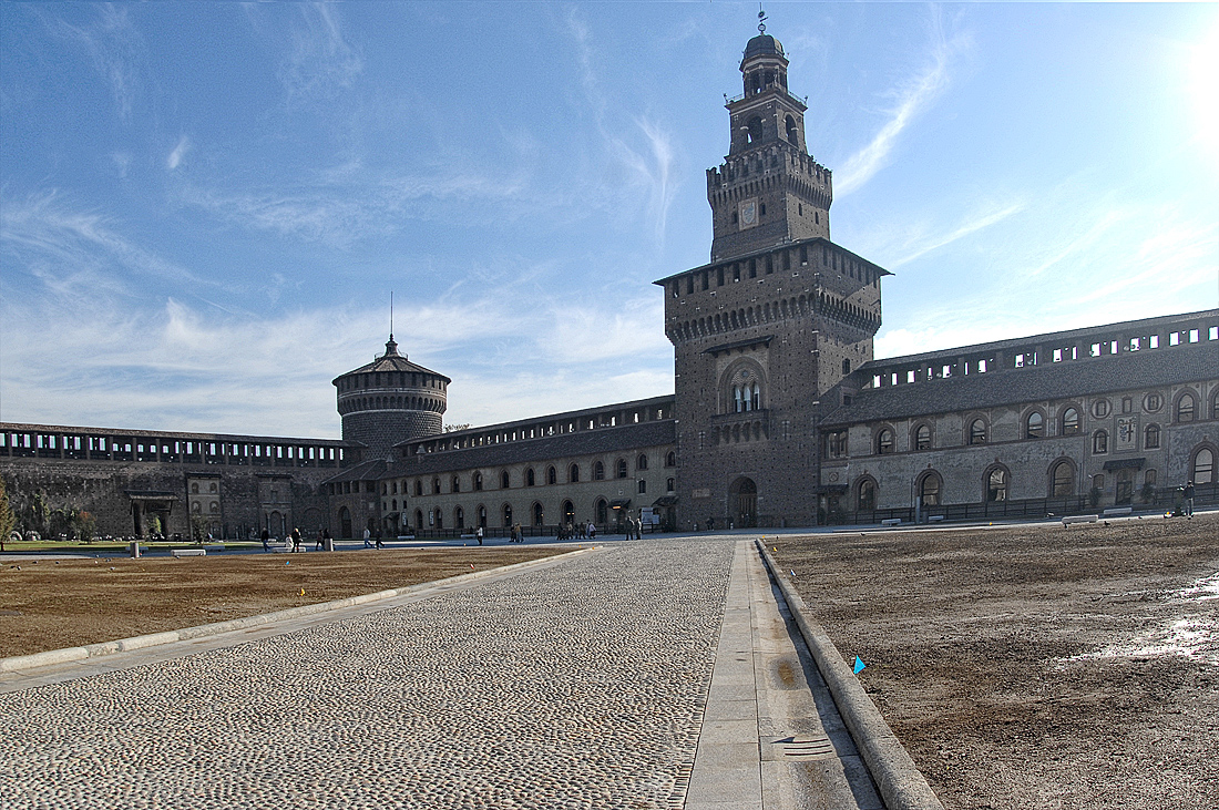 Castello Sforzesco (Замок Сфорце)